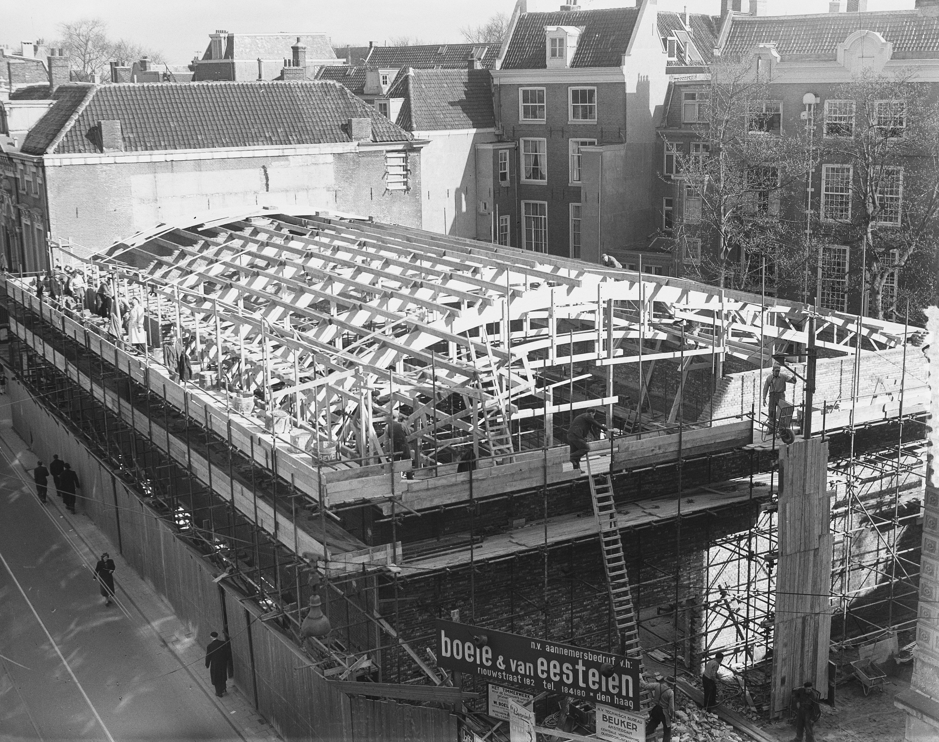 Collectie / Archief : Fotocollectie Anefo Reportage / Serie : [ onbekend ] Beschrijving : Aanbouw nieuw "Flora" Theater Amsterdam Datum : 13 april 1953 Locatie : Amsterdam, Noord-Holland Trefwoorden : bioscopen, theaters Instellingsnaam : Flora Fotograaf : Duinen, […] van / Anefo Auteursrechthebbende : Nationaal Archief Materiaalsoort : Glasnegatief Nummer archiefinventaris : bekijk toegang 2.24.01.09 Bestanddeelnummer : 905-6609